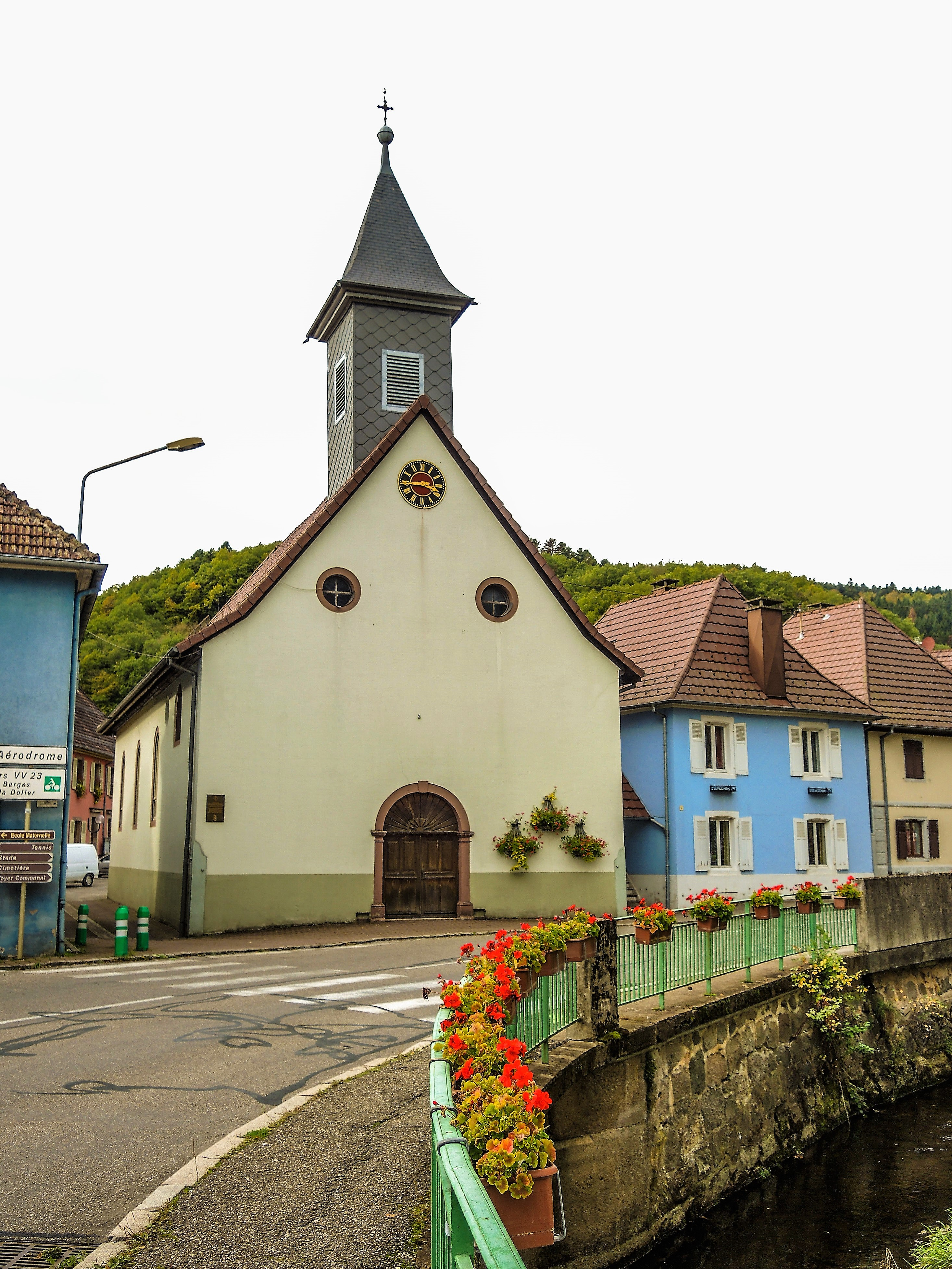 Eglise saint-Antoine-de-Padoue. Oberbruck. Haut-Rhin.